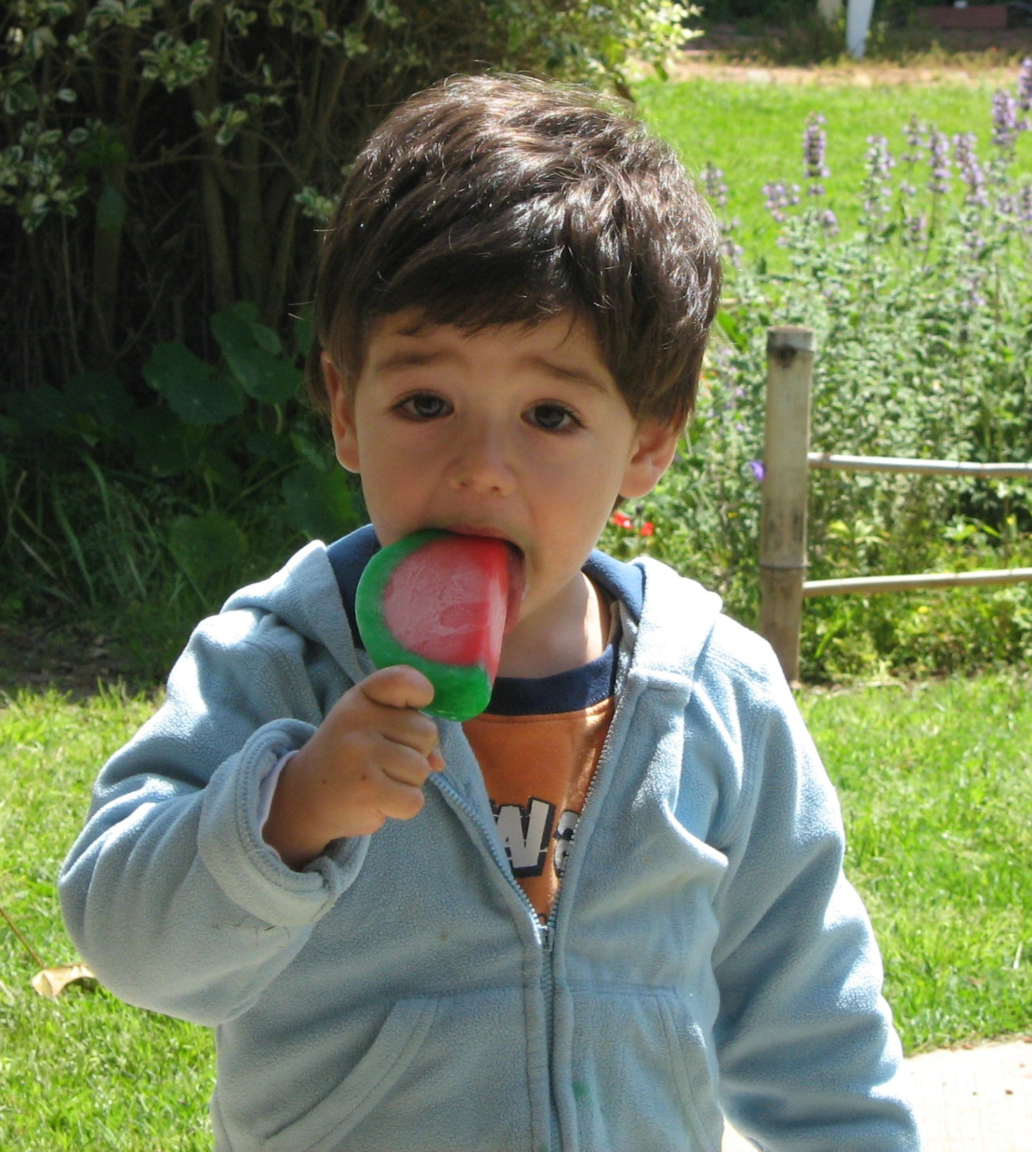 תינוק בן שנה ושמונה חודשים אוכל ארטיק אבטיח רישיון נוצר על ידי משתמש:גלנוס